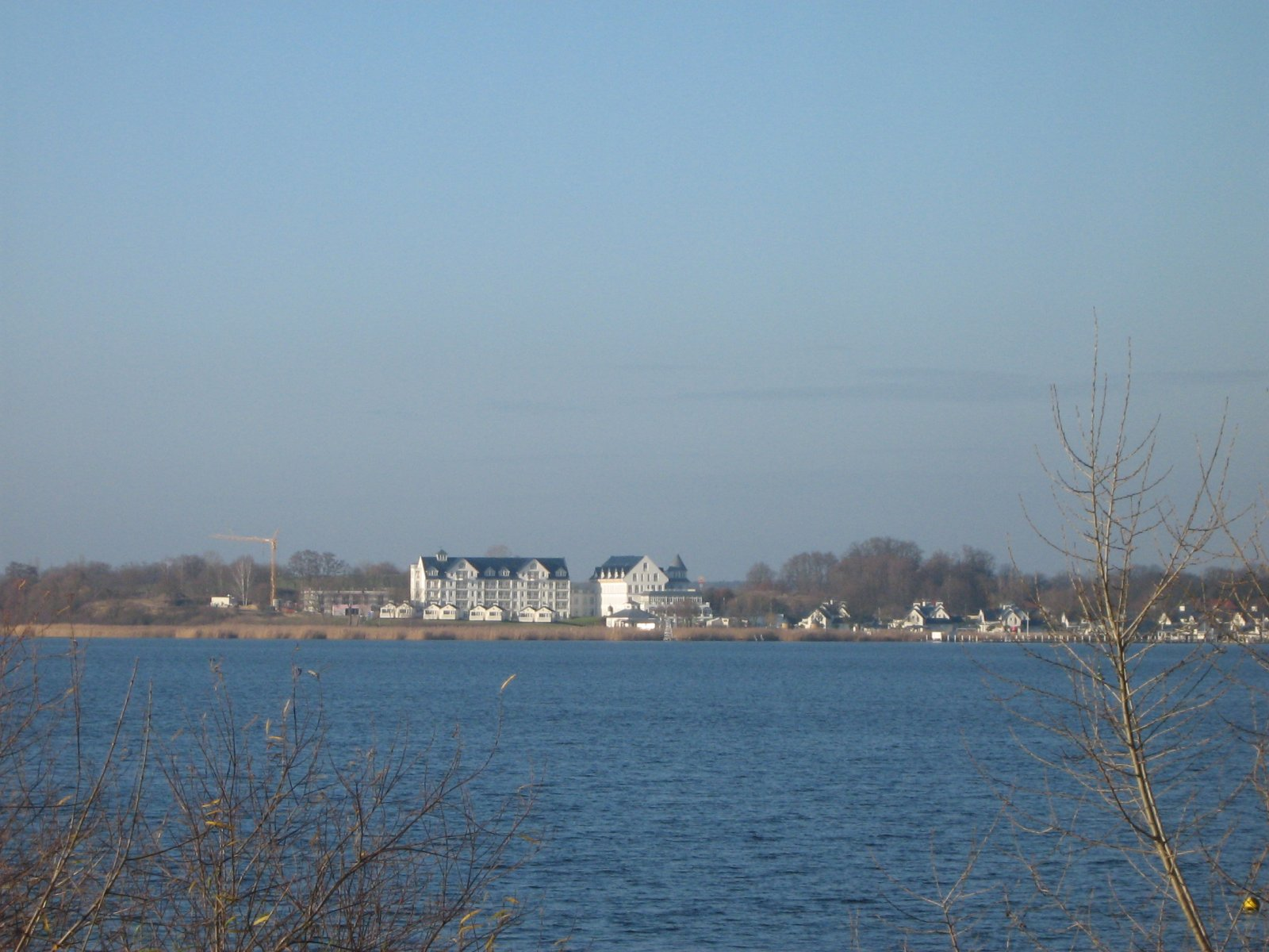 Hotel „Resort Schwielowsee“, in Petzow am Schwielowsee (Stadt Werder (Havel), Landkreis Potsdam Mittelmark, Brandenburg.